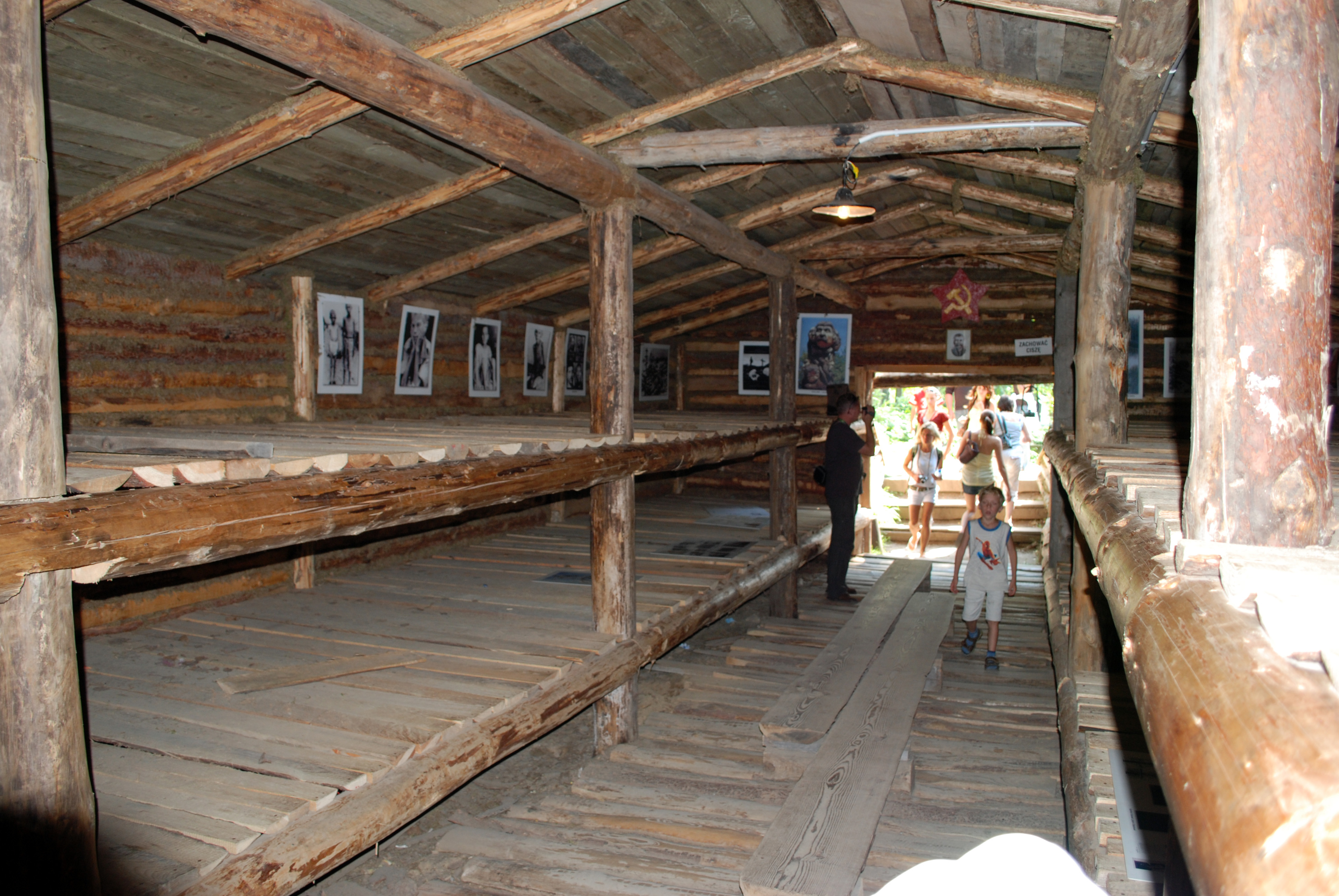 Replika typowego baraku z łagru w ZSRR w w Centrum Edukacji i Promocji Regionu w Szymbarku